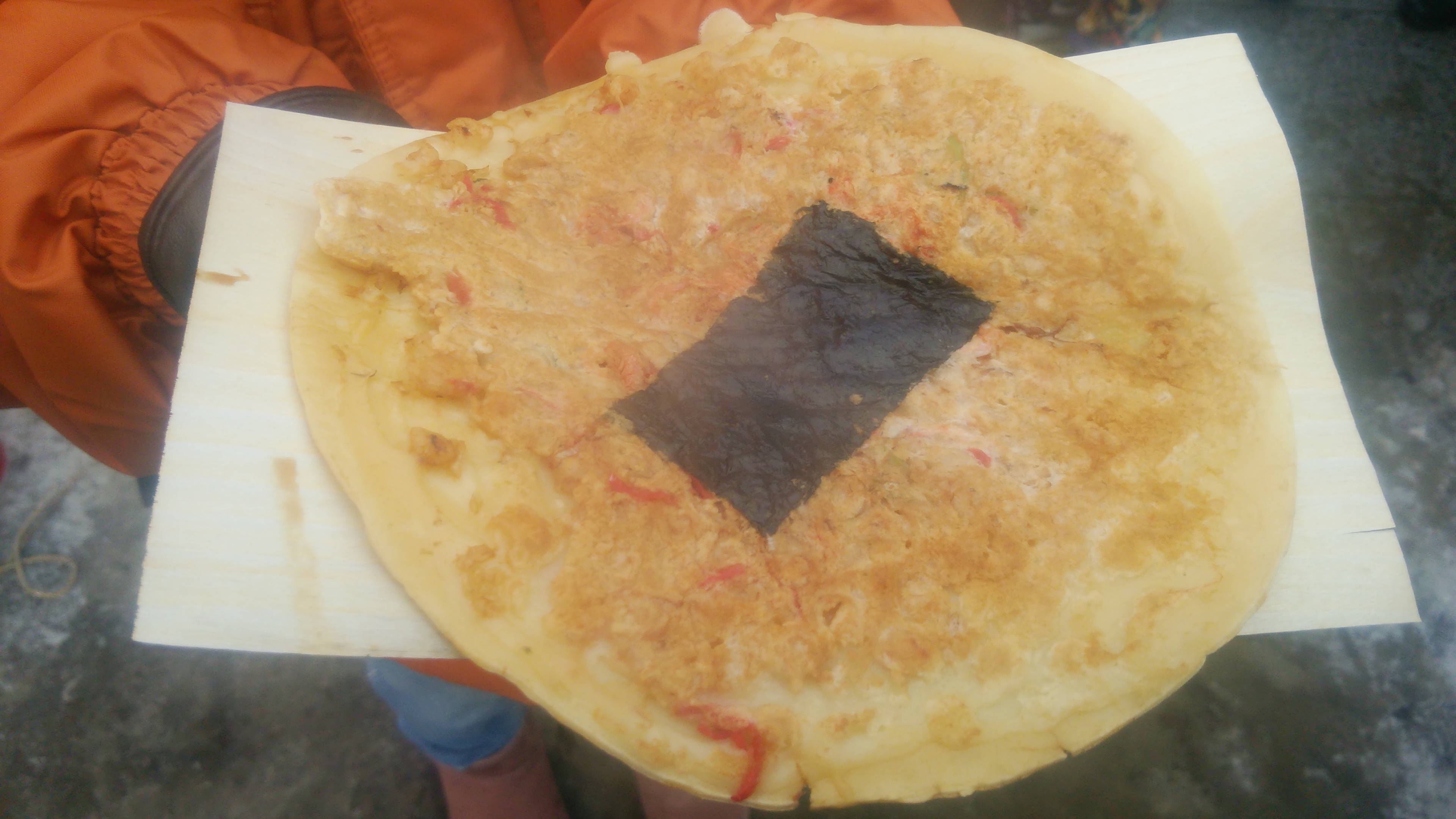 盛岡八幡宮境内にて購入 ささき商店のうす焼き